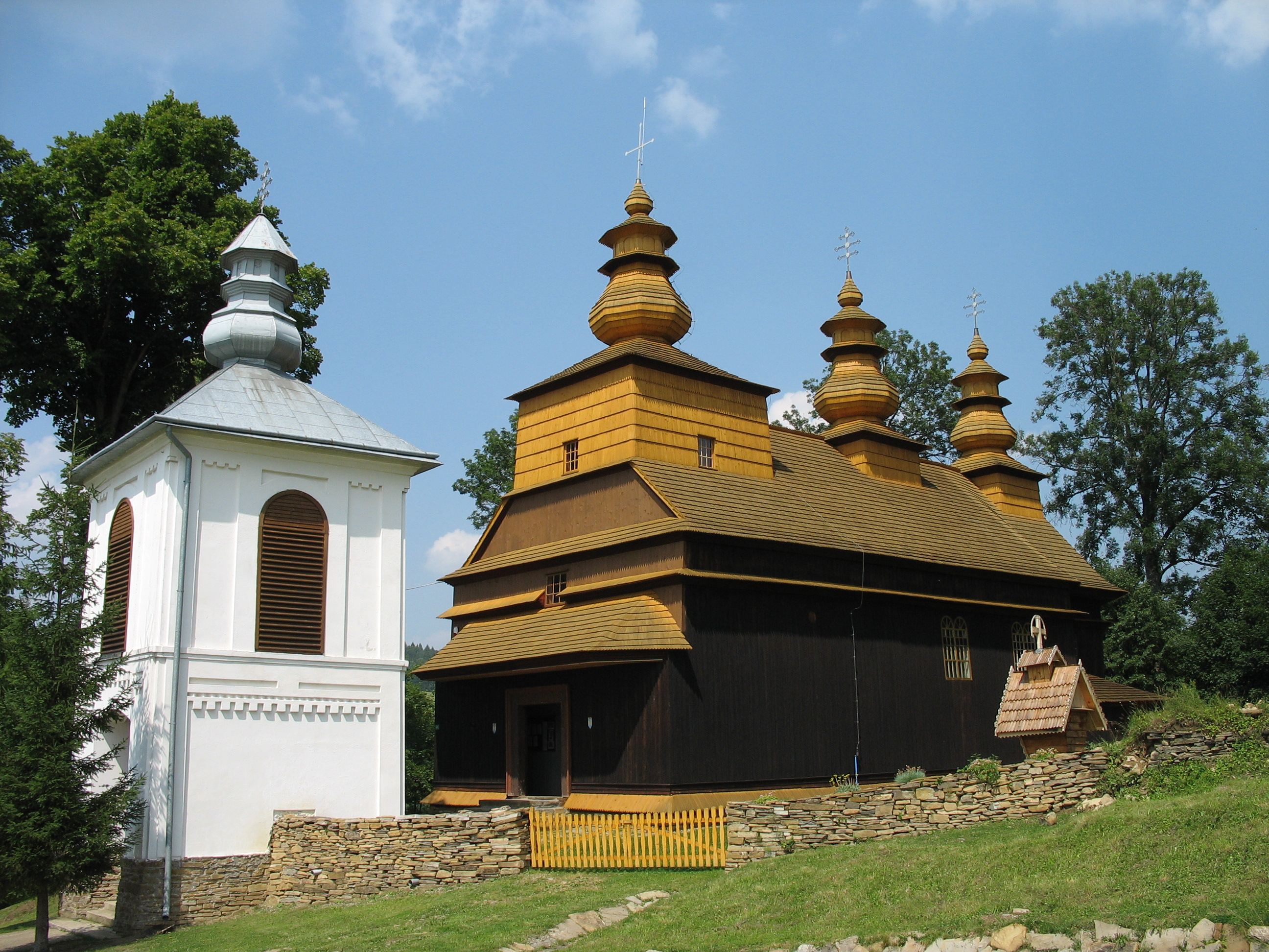 Dawna cerkiew greckokatolicka (obecnie kościół rzymskokatolicki) w Wisłoku Wielkim